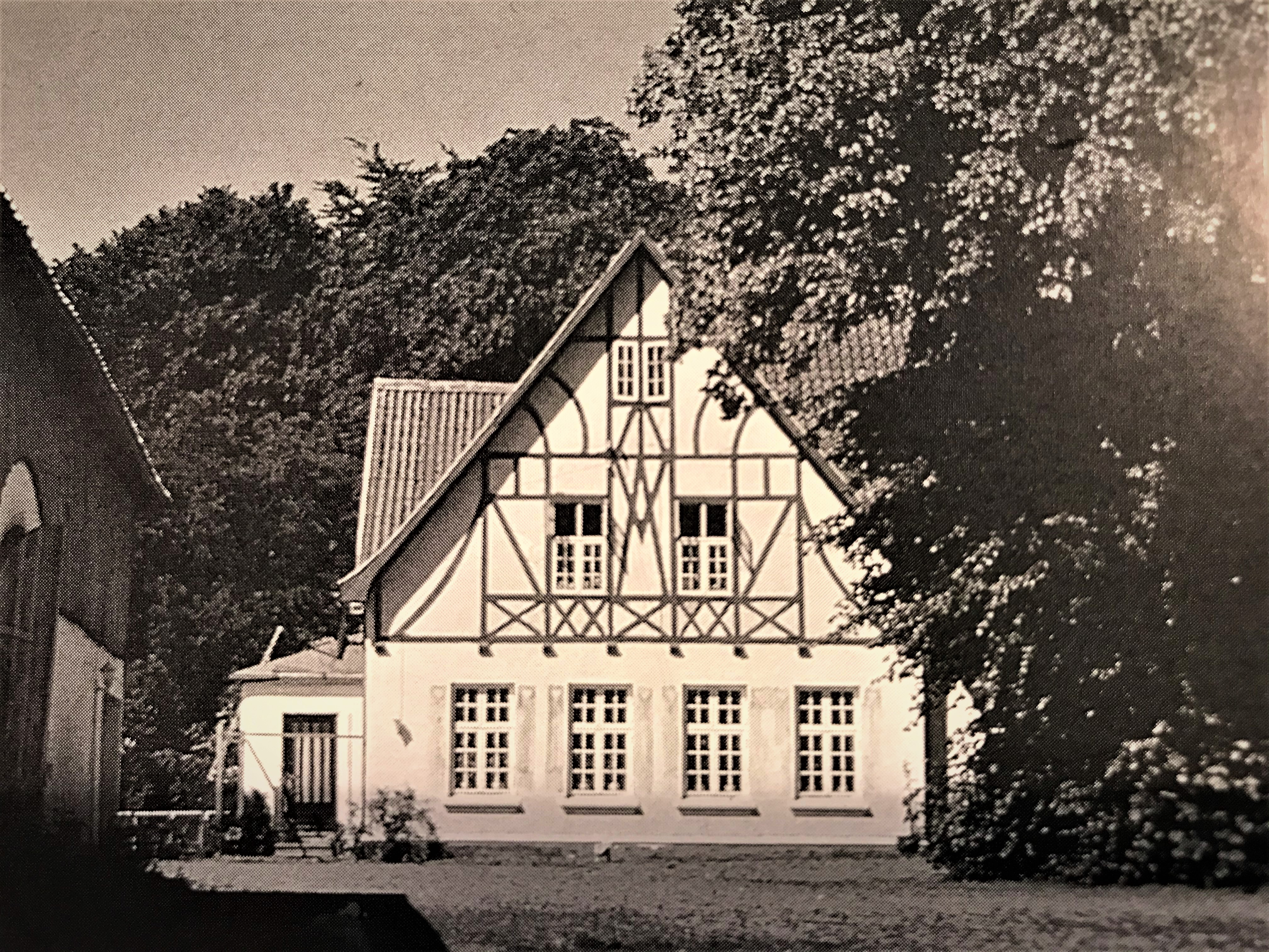 H. E. Sørensen; Slotte, herregårde og voldsteder i Sønderjylland, 1994